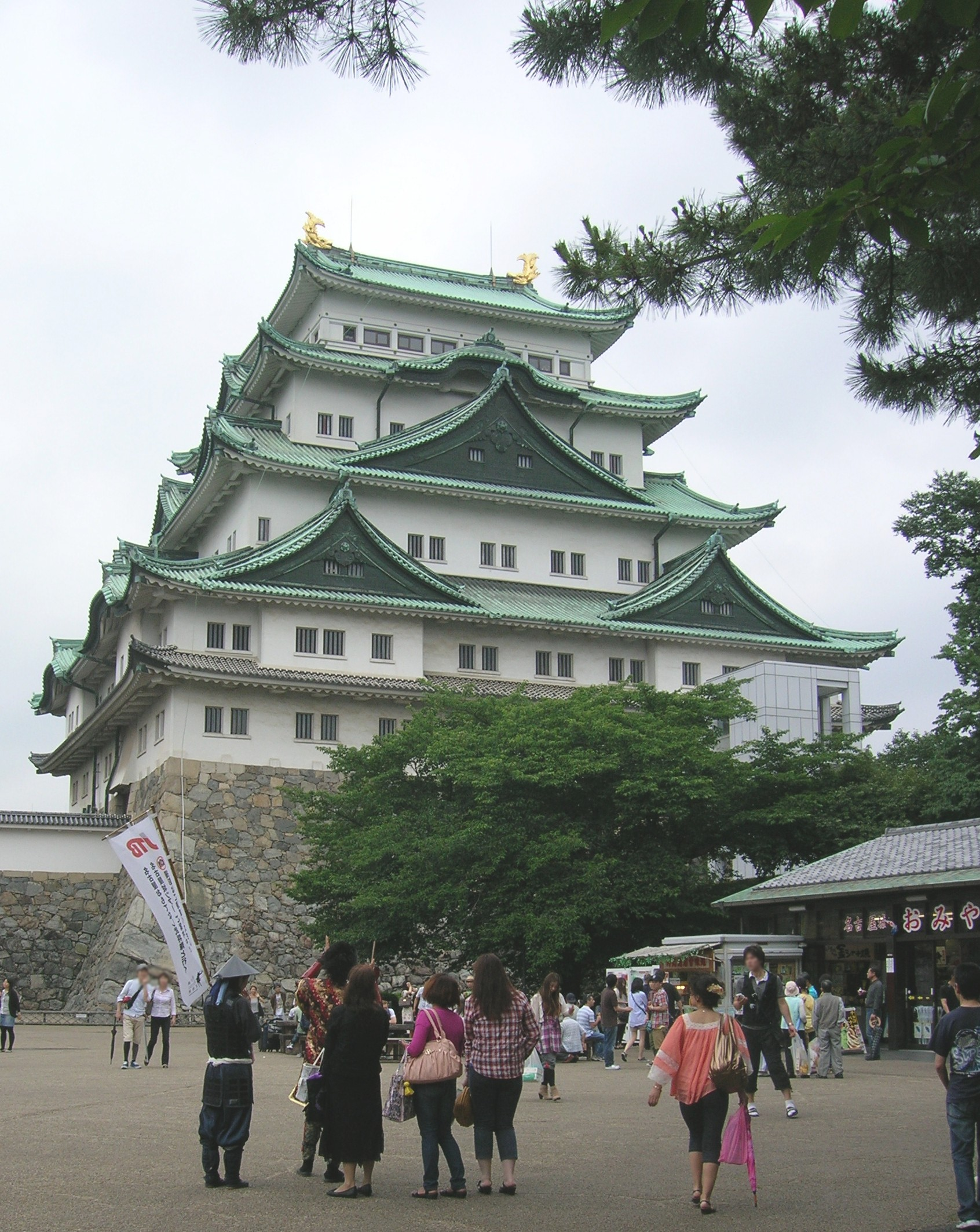 Nagoya Omotenashi Busho-tai (Maeda Keiji and Jingasa-tai). Loc: Nagoya city, Aichi Prefecture, Japan. 名古屋おもてなし武将隊。観光案内をする前田慶次と陣笠隊。 撮影場所 愛知県名古屋市・名古屋城